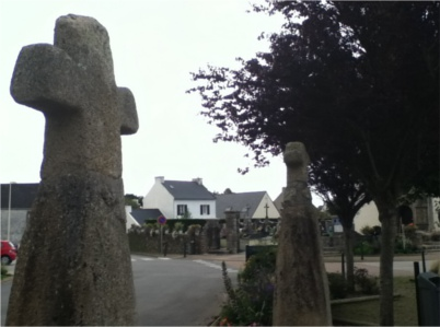 Menhirs Christianisés du bourg.